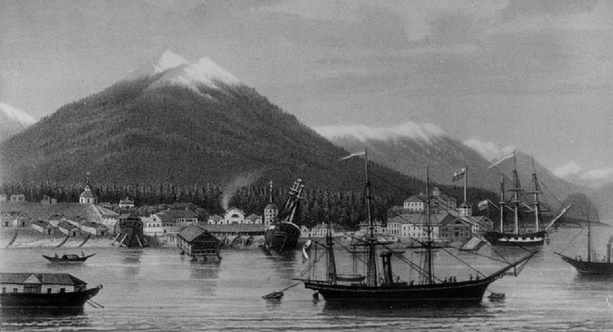 Ново-Архангельск. Лит. П. Смирнова. 1863 г. Из: США - экономика, политика, идеология. №3 1990 год